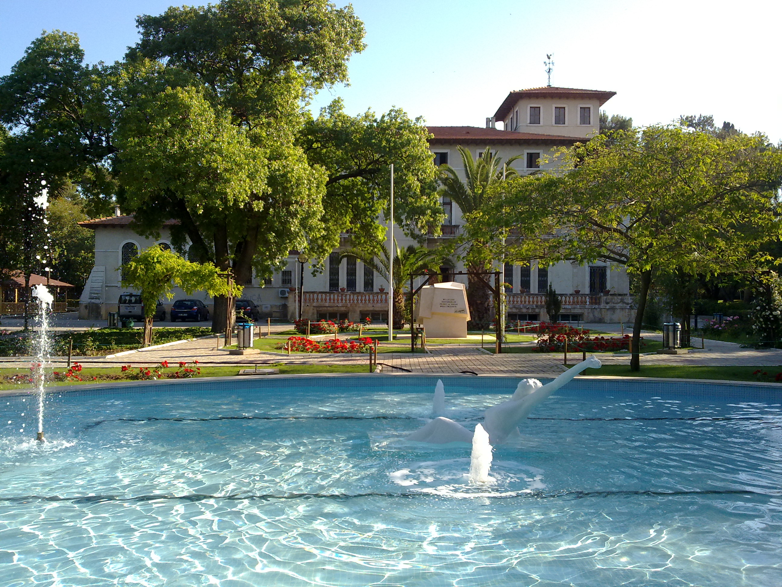 Buca Eğitim Fakültesi Dekanlık Karşısı Havuz